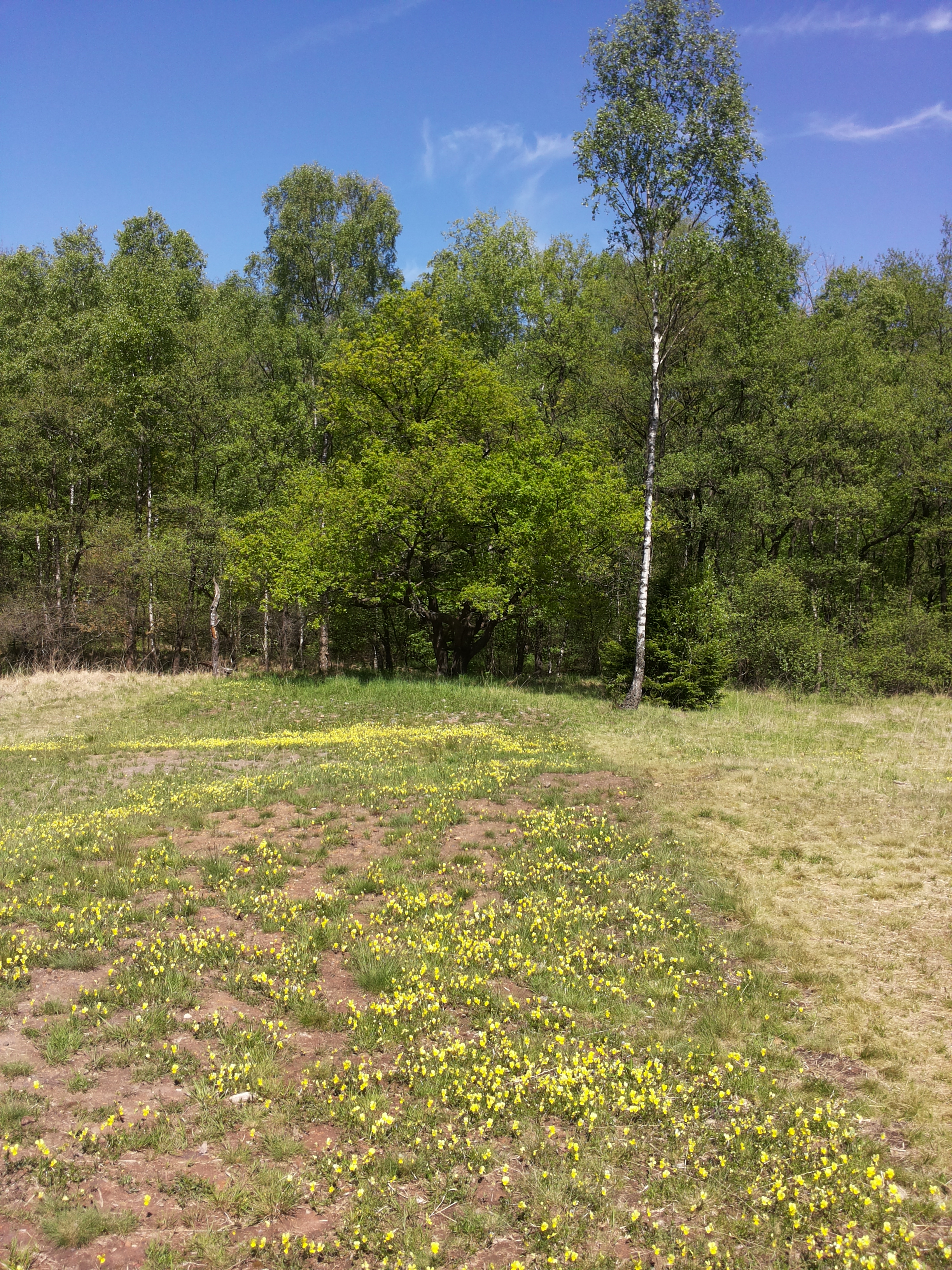 Wiese mit Galmeiveilchen nah bei Kelmis am Oskarstollen